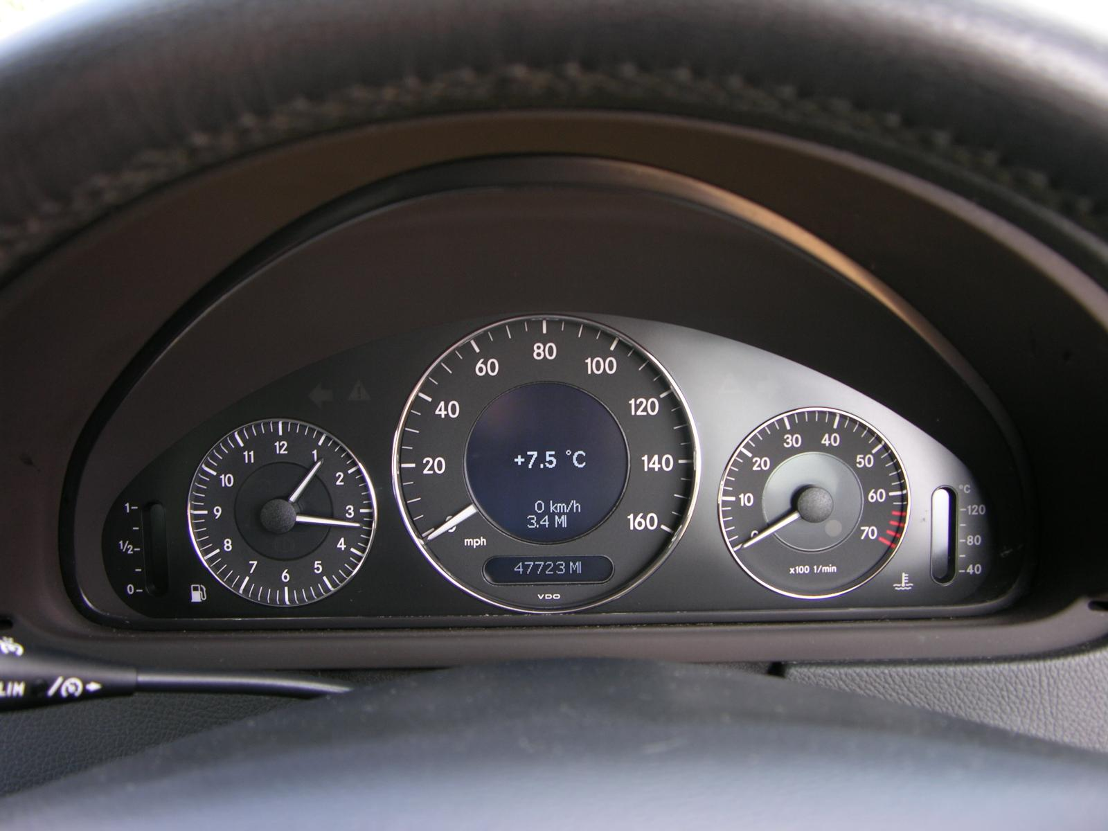 Mercedes Benz CLK 200 Kompressor